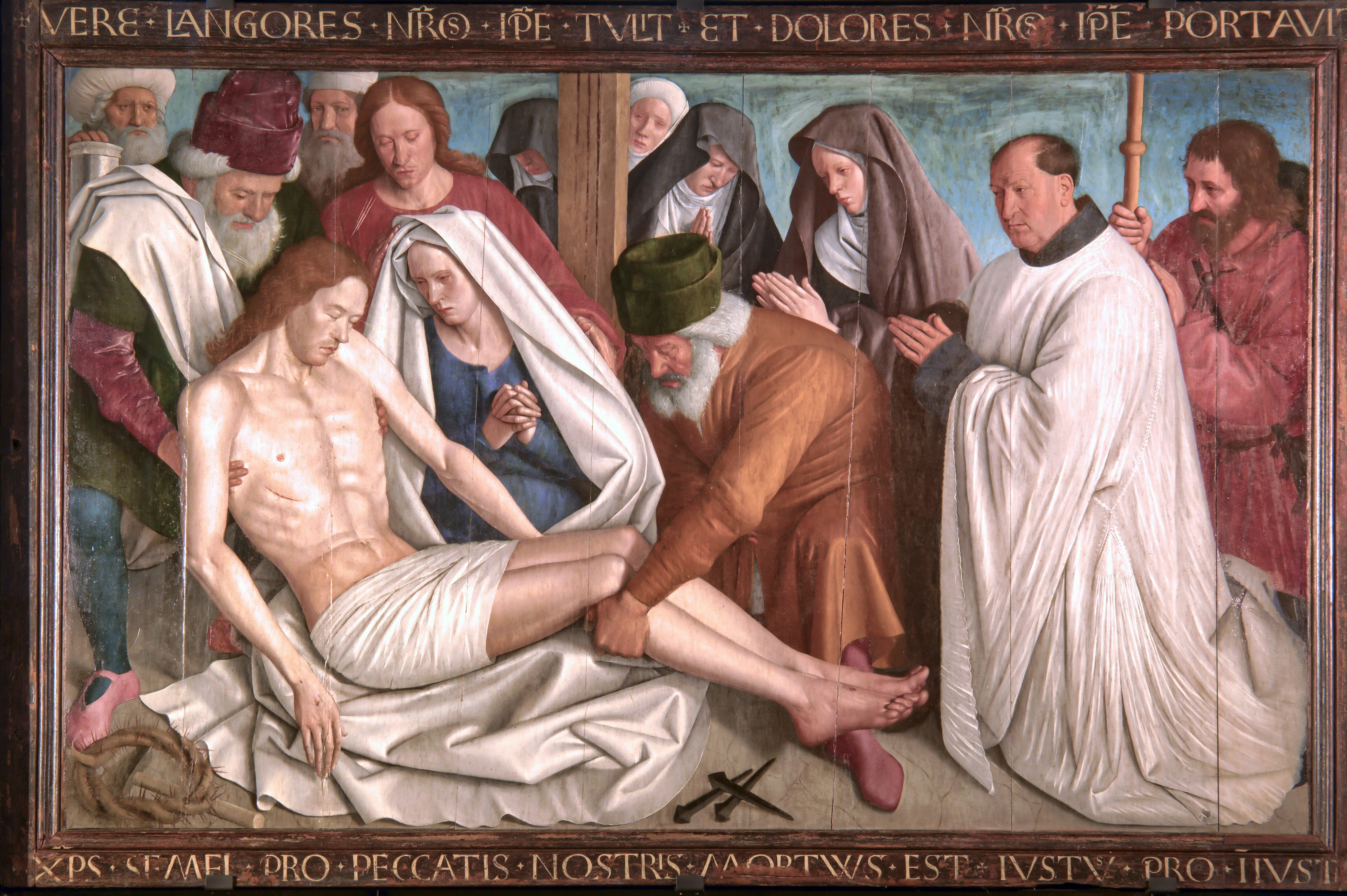 Stiftskirche Saint-Martin in der Gemeinde Nouans-les-Fontaines im Departement Indre-et-Loire/Frankreich - Piéta von Jean Fouquet, um 1465